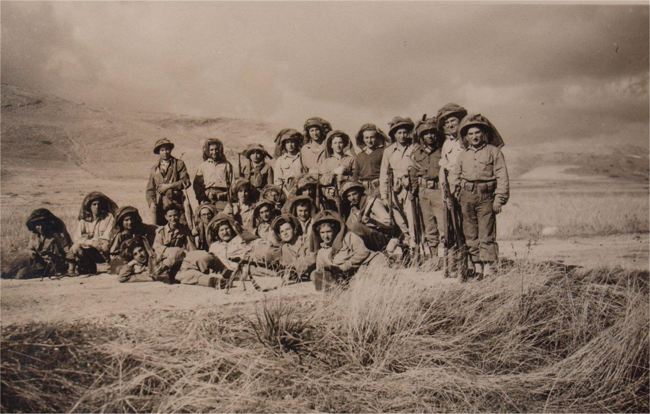 המחלקה של אבא מגדוד ברק בגולני, השתתפה בקרבות של עמק הירדן במלחמת השחרור, בזמןהפוגה ראשונה מתאמנת ושומרת על משטרת גשר